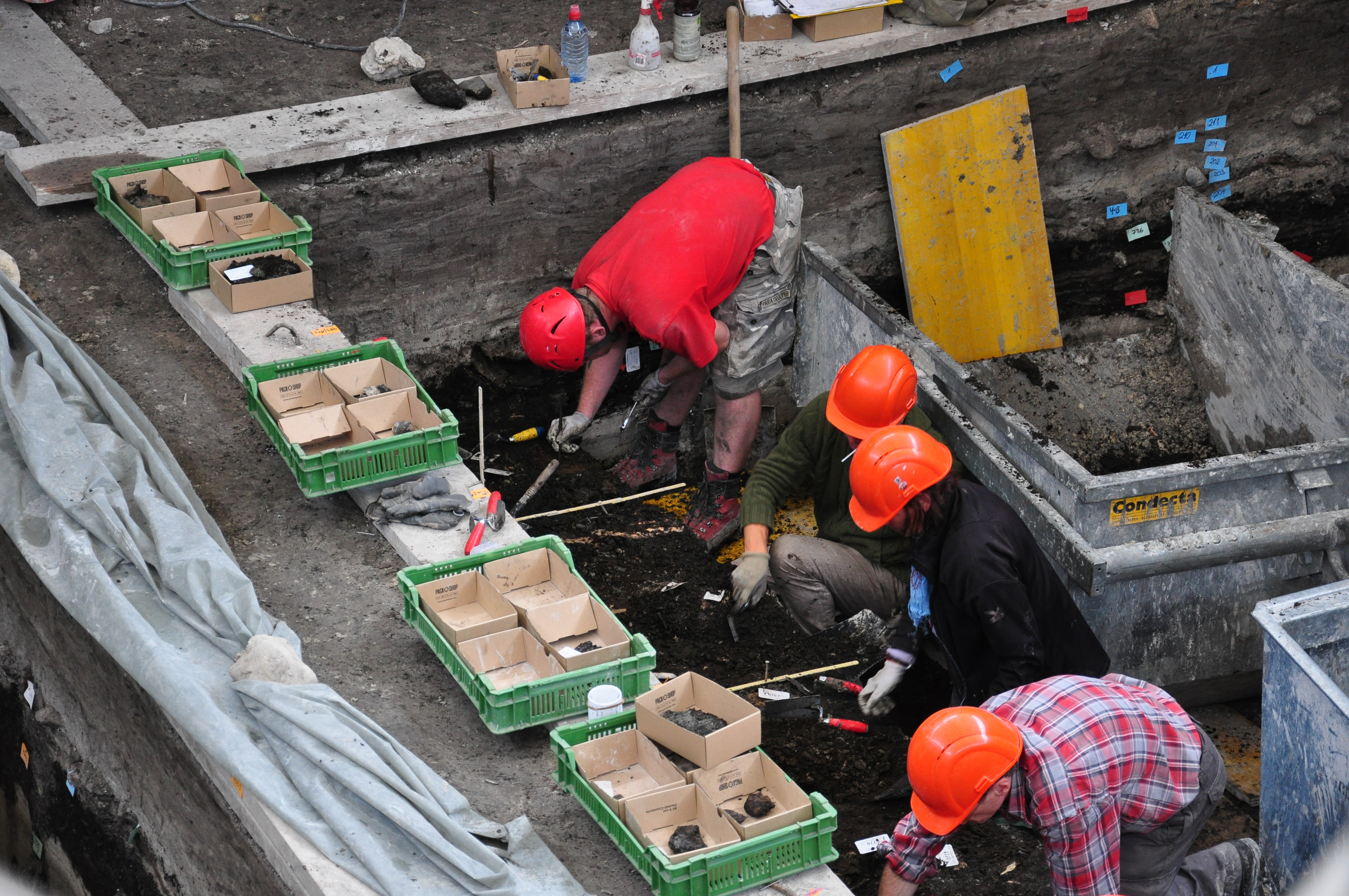 Archäologische Grabung Parkhaus Opéra in Zürich (Switzerland)